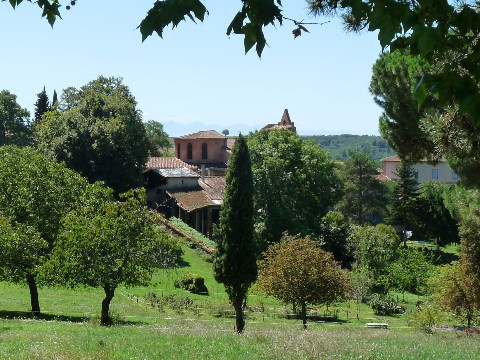 Mauvaisin, vue du nord, Haute-Garonne, France